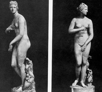 A imagem foi encontrada na página de uma Universidade, a Assumption College (página principal da universidade, em inglês) que utiliza em seus editorais online imagens liberadas ao domínio público. A subpágina do site que contém um link para a imagem é esta. E há também um link direto para a imagem (encontra-se em formato GIF; eu mesmo converti para JPG). Redux 18:41, 27 Outubro 2006 (UTC)